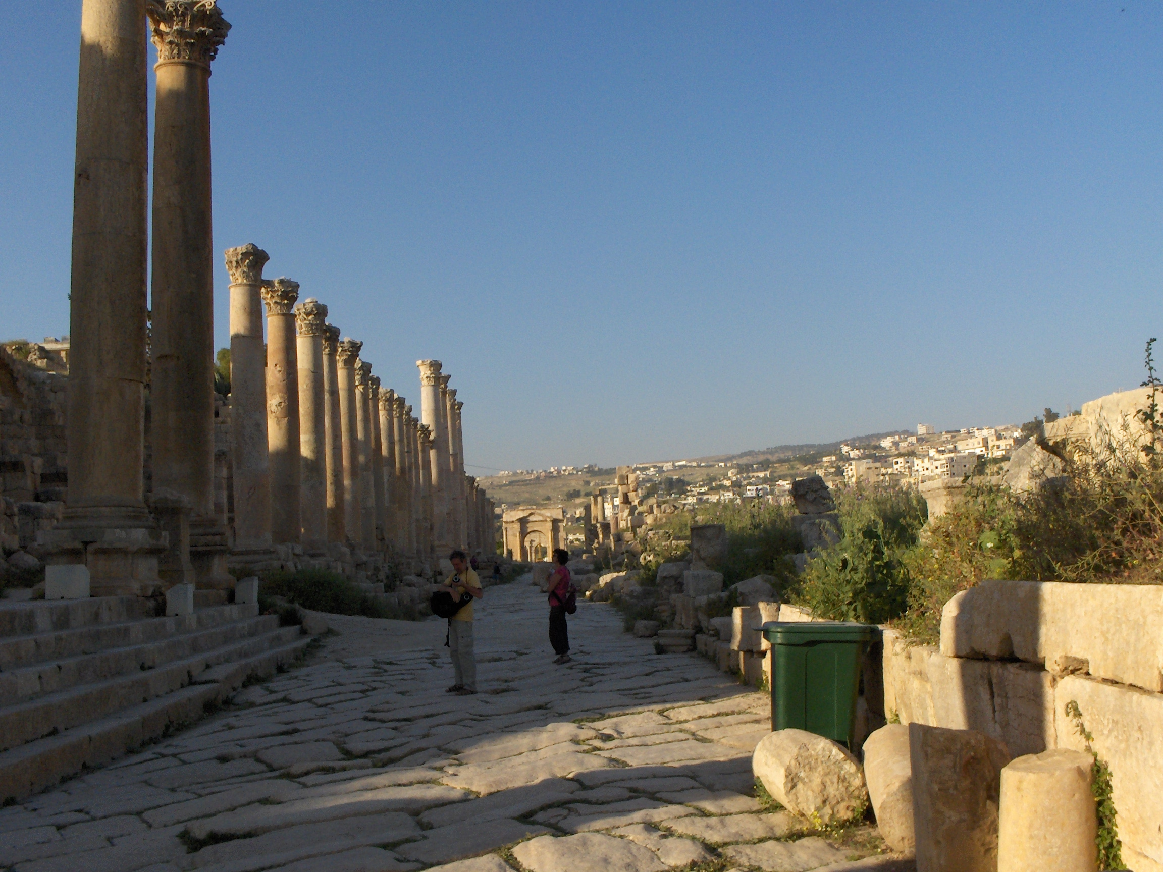 la porta nord di Jerash, Giordania